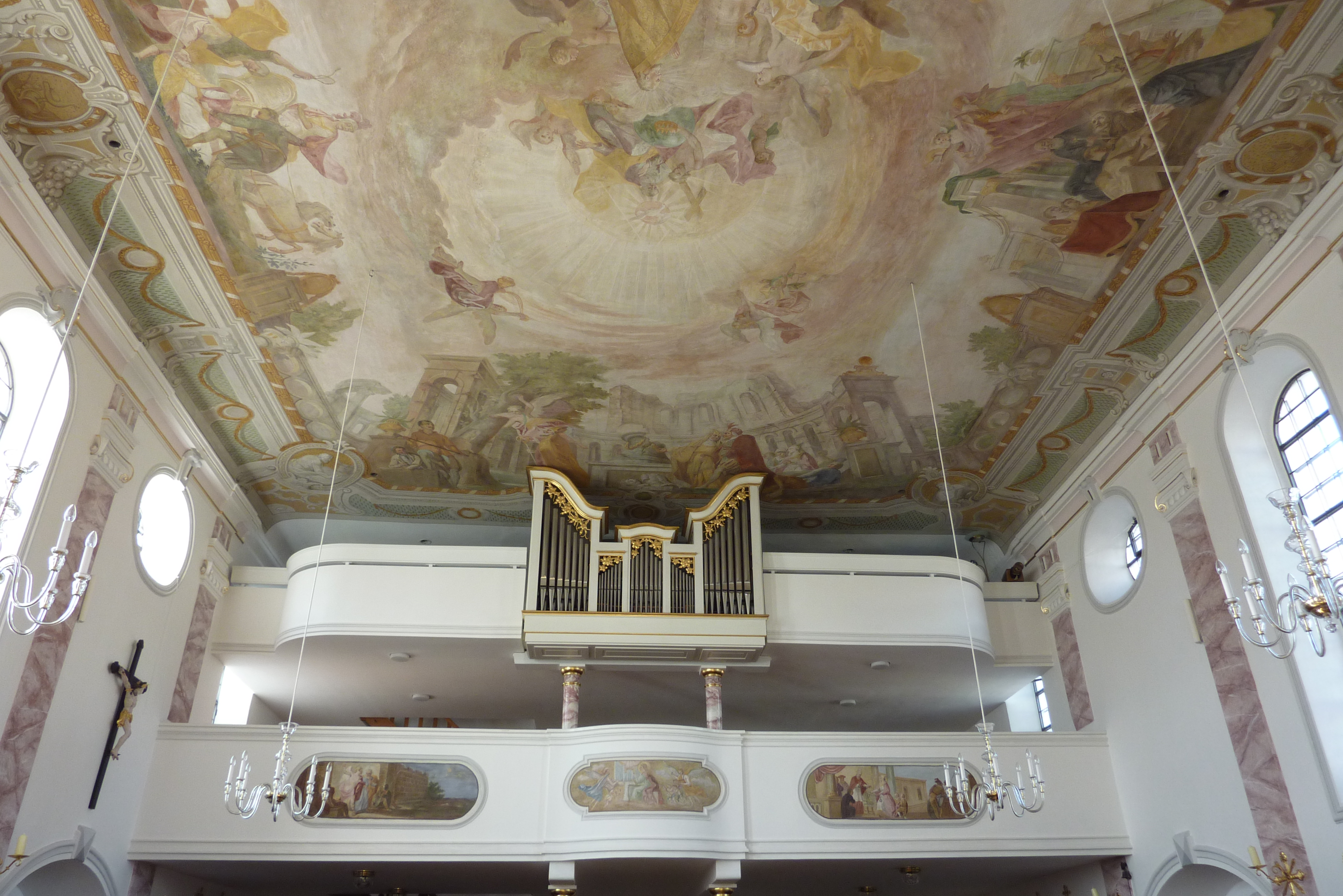 Katholische Pfarrkirche St. Martin in Mörslingen im Landkreis Dillingen an der Donau, Deckenfresko von Joseph Leitkrath von 1782, in der Mitte Verklärung und Krönung des hl. Martin, am Westrand Mann in zeitgenössischer Kleidung und Tabakspfeife (vielleicht Selbstporträt des Künstlers)